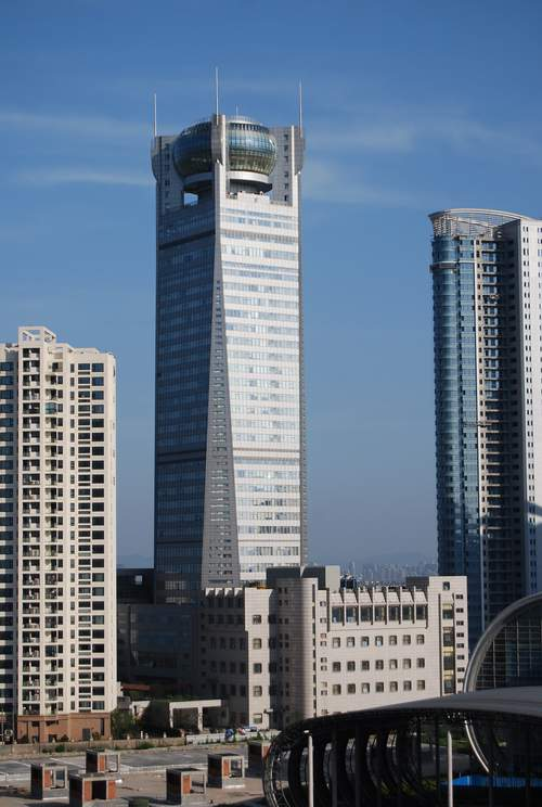 天元大厦